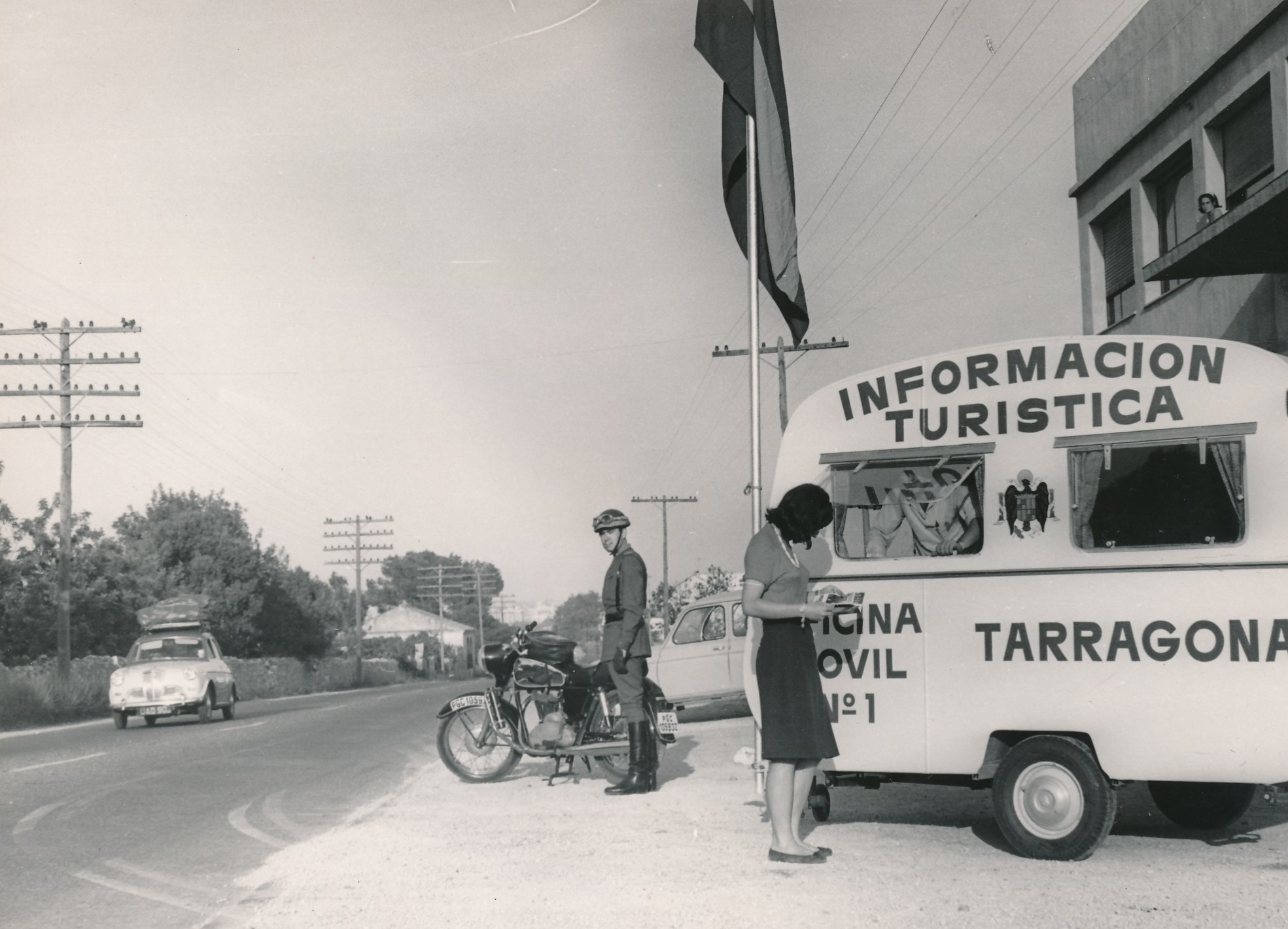 Tarragona Procedencia: Desconocido Fotógrafo: Vallvé Registro nº: 00982 Signatura: Caja 10 Fondos: Biblioteca de la Facultad de Empresa y Gestión Pública (Universidad de Zaragoza) Legado: Luis Fernández Fuster / E.S. Turismo Huesca